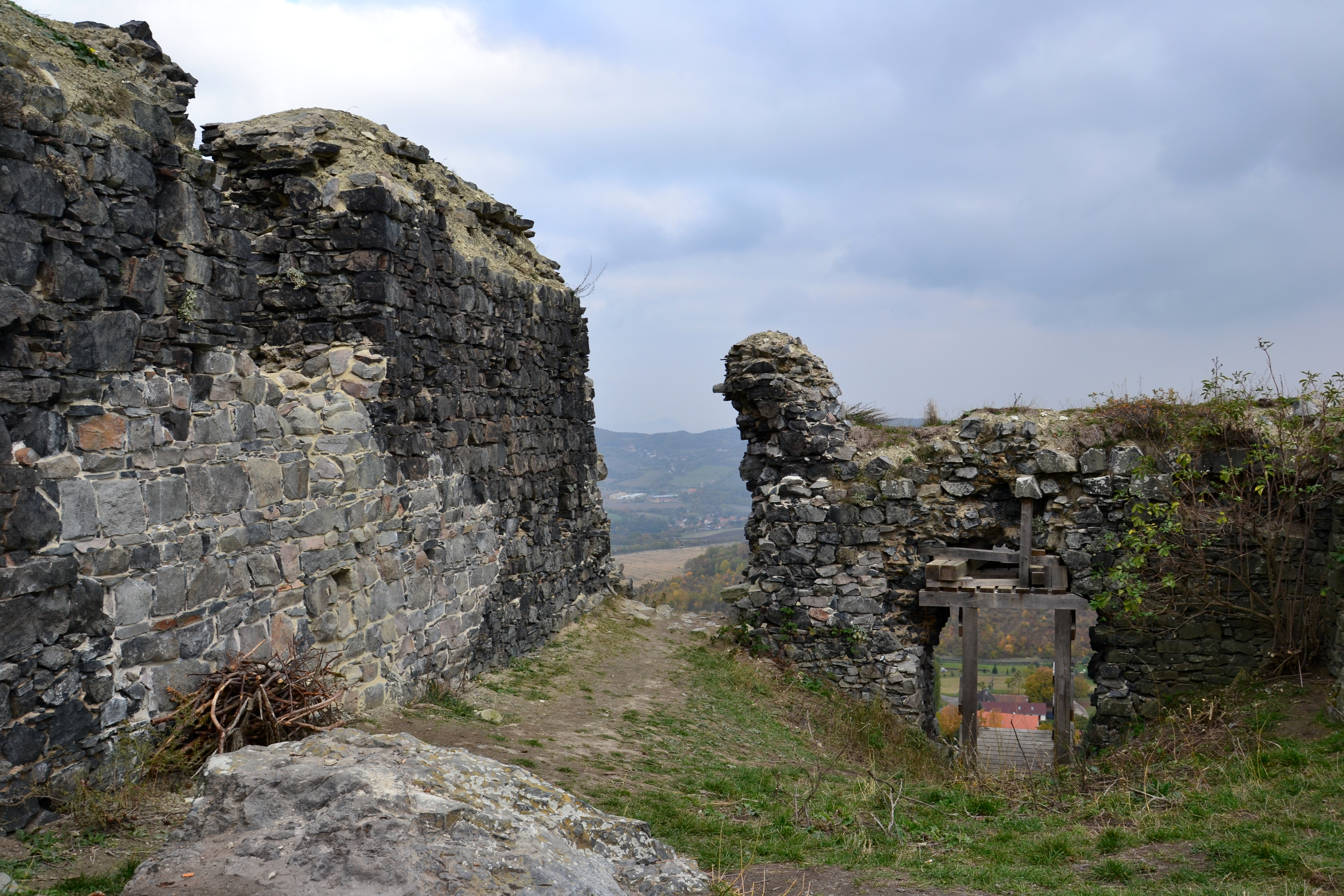 Oltářík – severovýchodní roh interiéru obytné věže s otvorem v místech původního vstupu